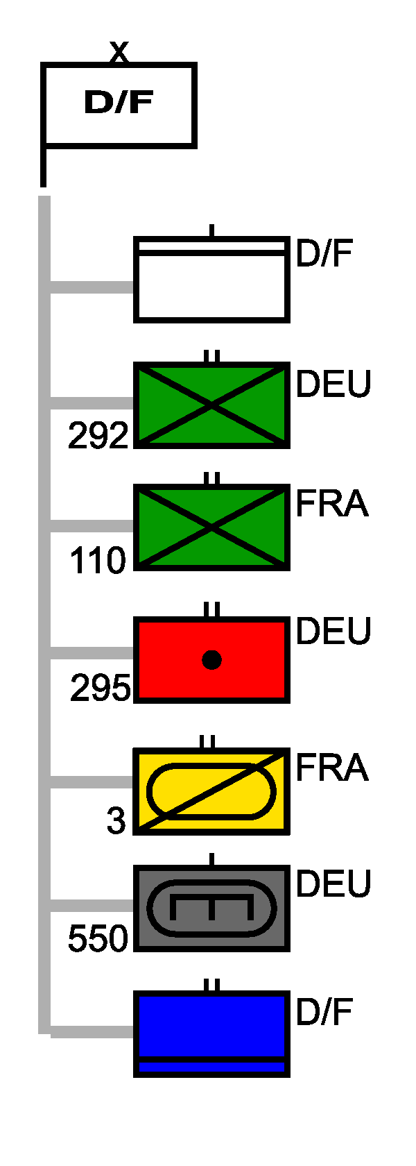 Gliederung Deutsch-französische Brigade im deutschen und französischen Heer.